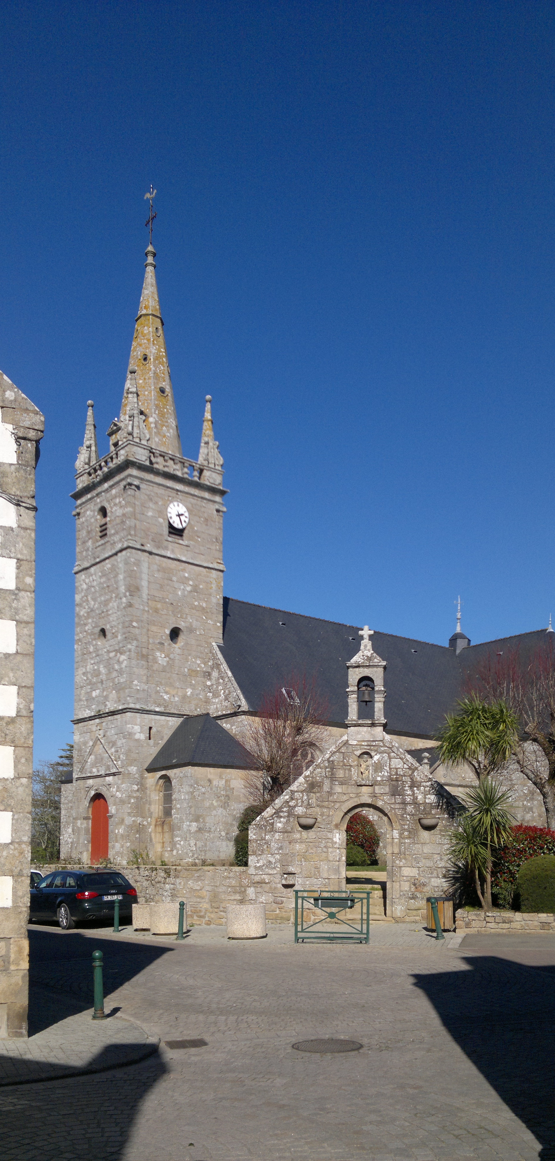 Église Saint-Thuriau (1809), Fr-56-Crac'h.